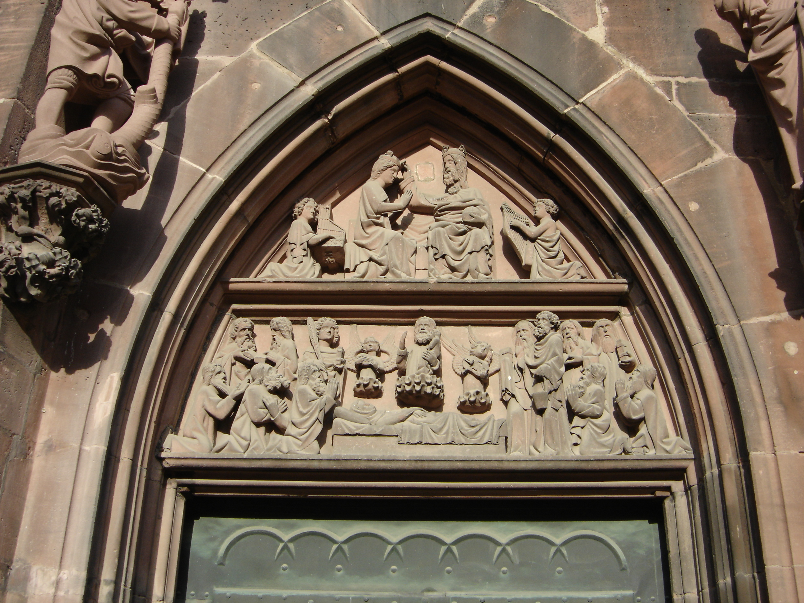 Marienportal auf der Südseite des Chores des Freiburger Münsters, im Tympanon der Tod und die Krönung Marias, auf den Konsolen darüber der hl. Christophorus und Maria mit Kind (Kopien), Parlerwerkstatt (1360) Heike Mittmann, Das Münster zu Freiburg im Breisgau ISBN 978-3-933784-26-1